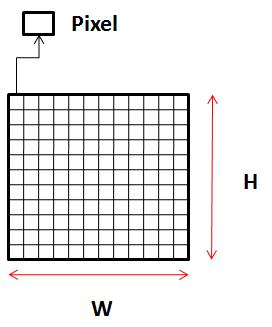 Descrizione di un pixel